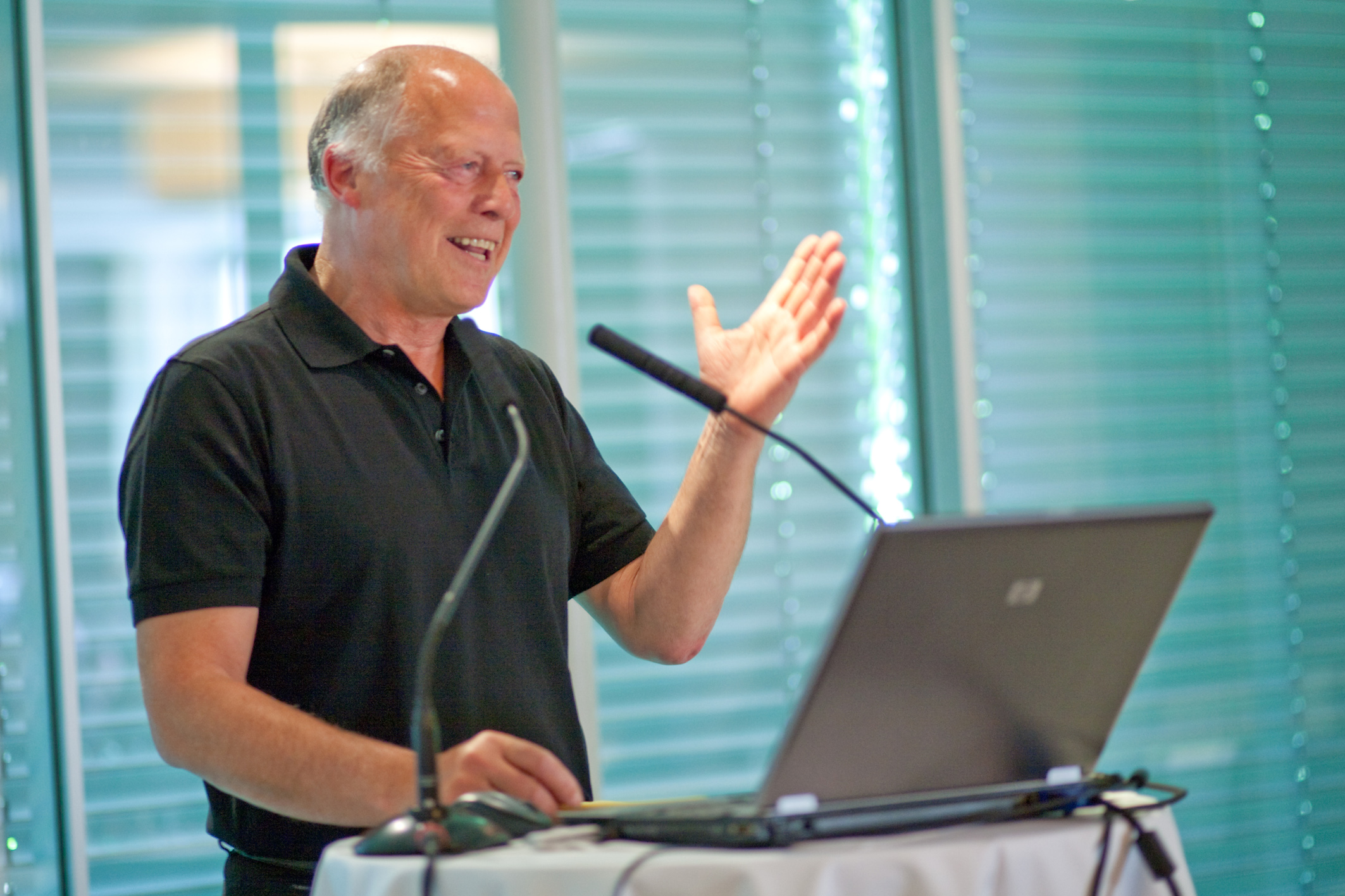 Werner Lenz bei einem Vortrag